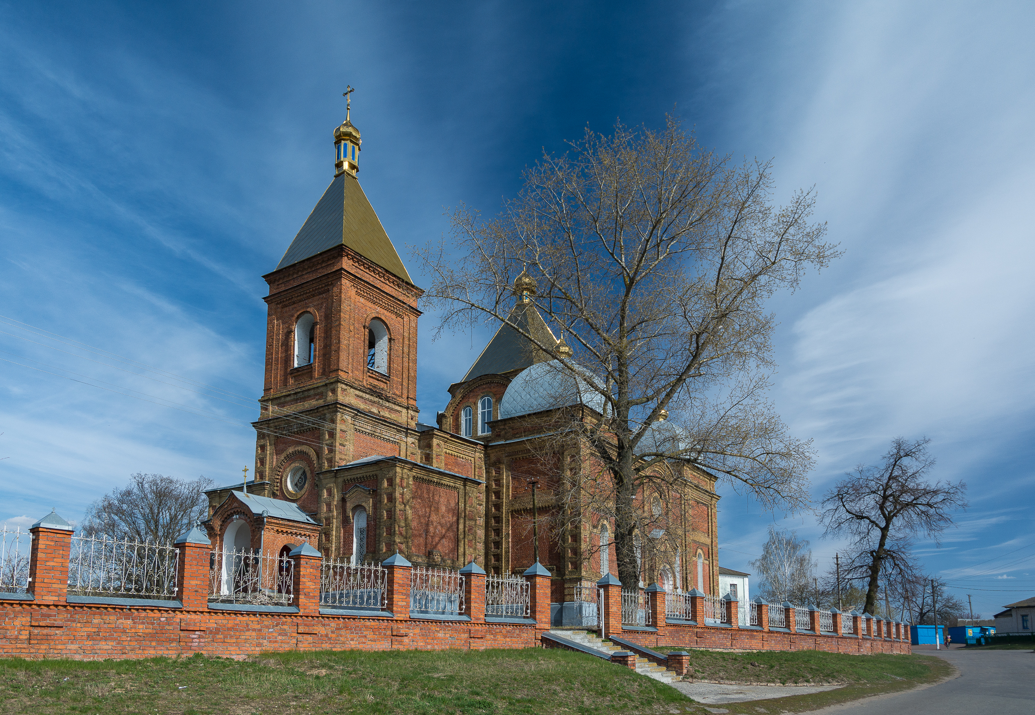 Ансамбль Покровської церкви (мур.), село Вирівка, вул. Будьонного, 27